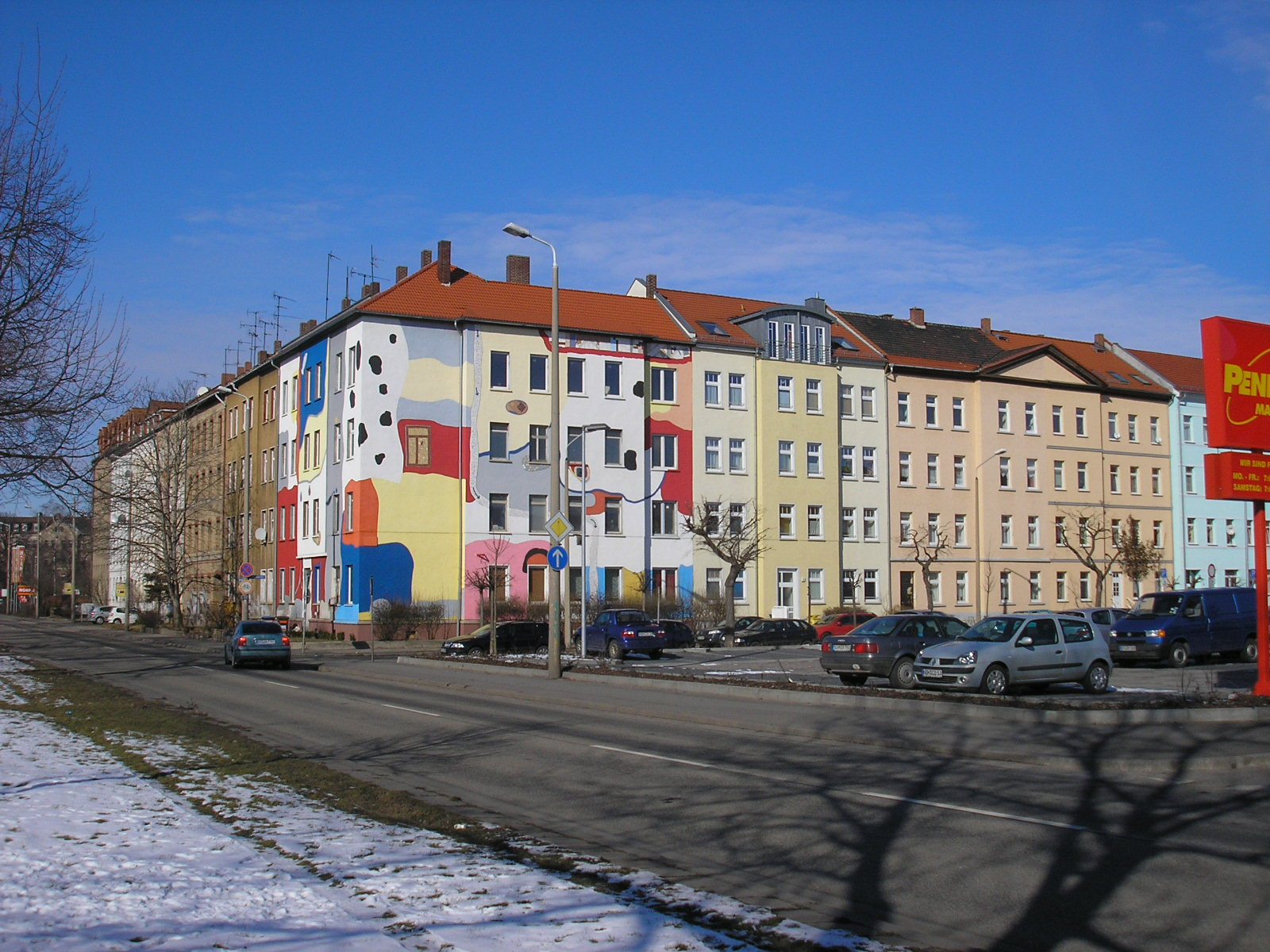 Häuserblock Stauffenbergallee/Schapirostraße in Erfurt (Thüringen).